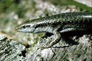 Slevin's skink (Emoia slevini)